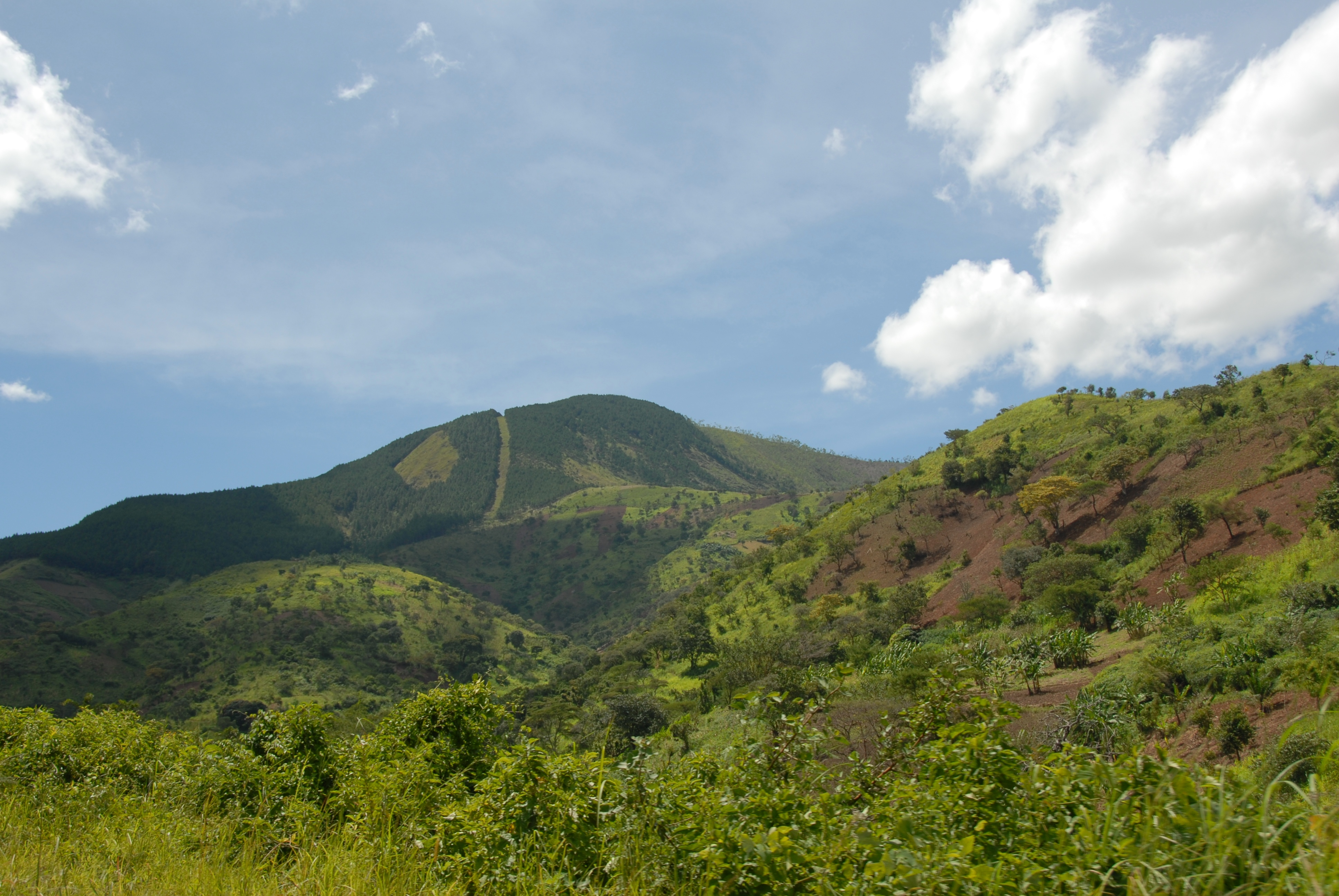 Road between Bujumbura and Makamba